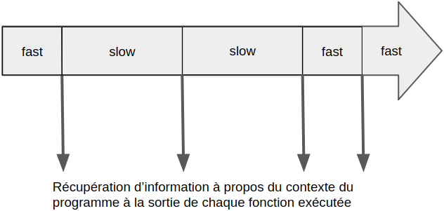 Le programme se fait interrompre à chaque fois qu'une fonction fini de s'exécuter.